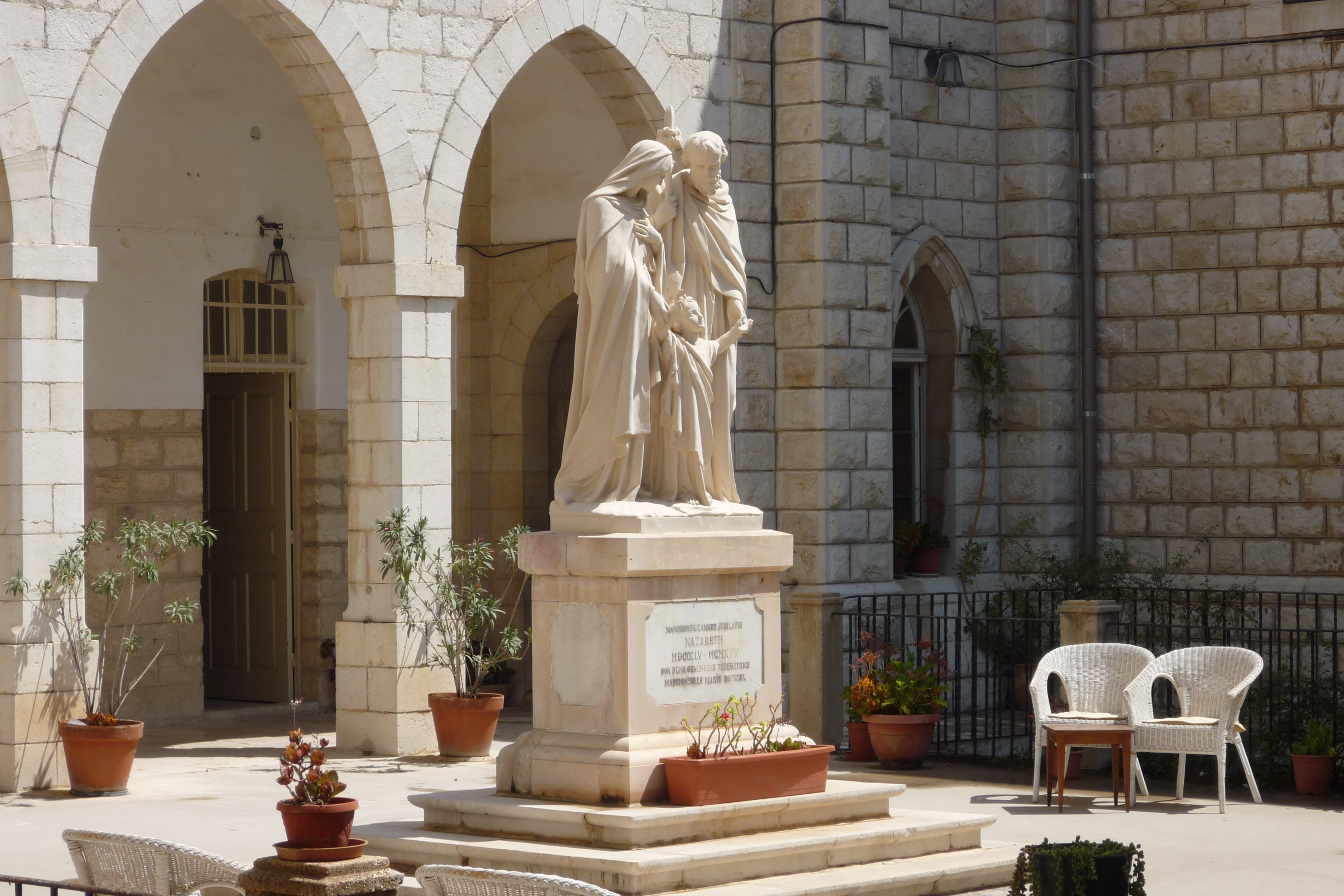 Dziedziniec klasztoru Sióstr Nazaretanek w Nazarecie (Izrael)